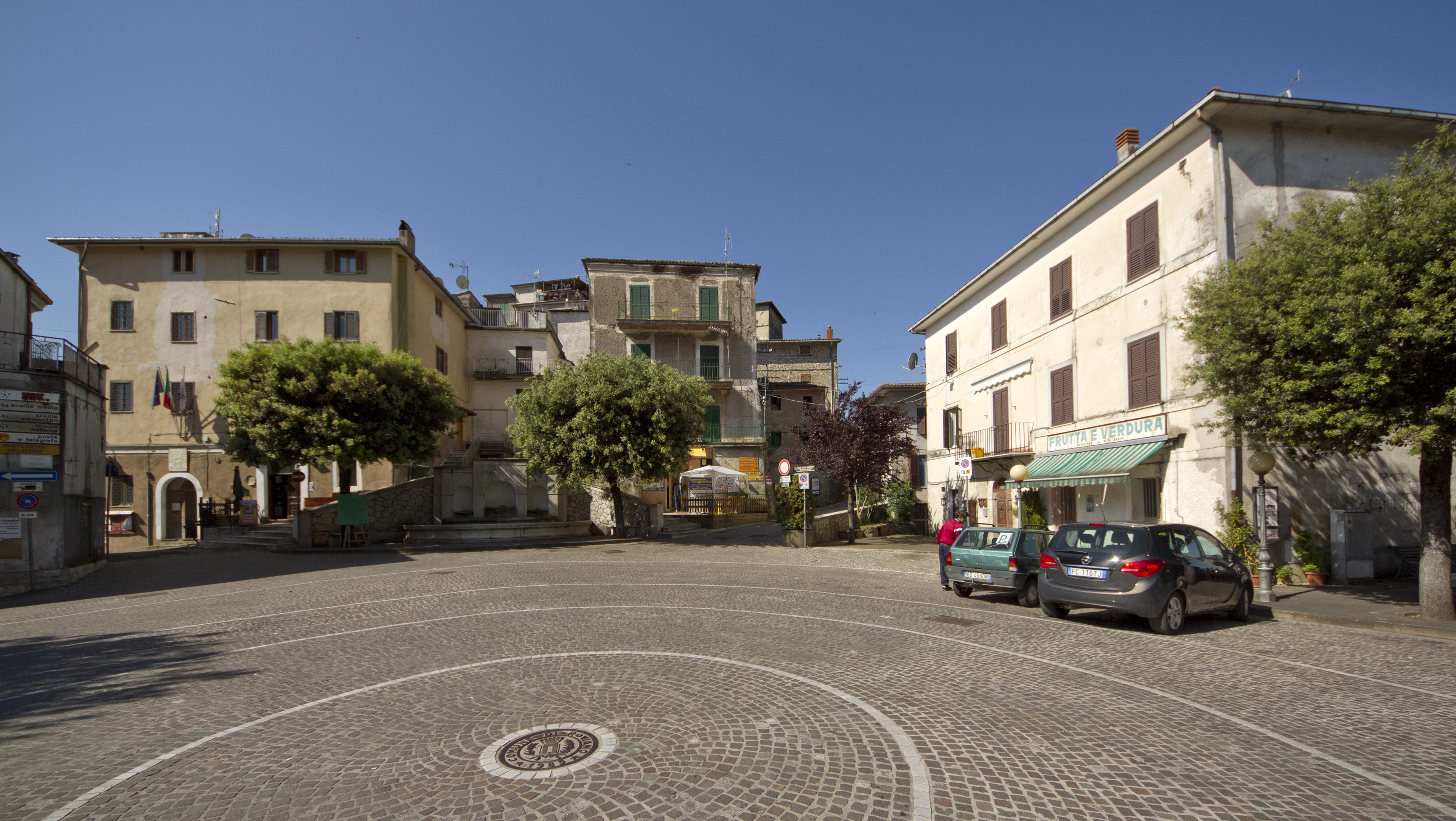 00027 Roviano RM, Italy